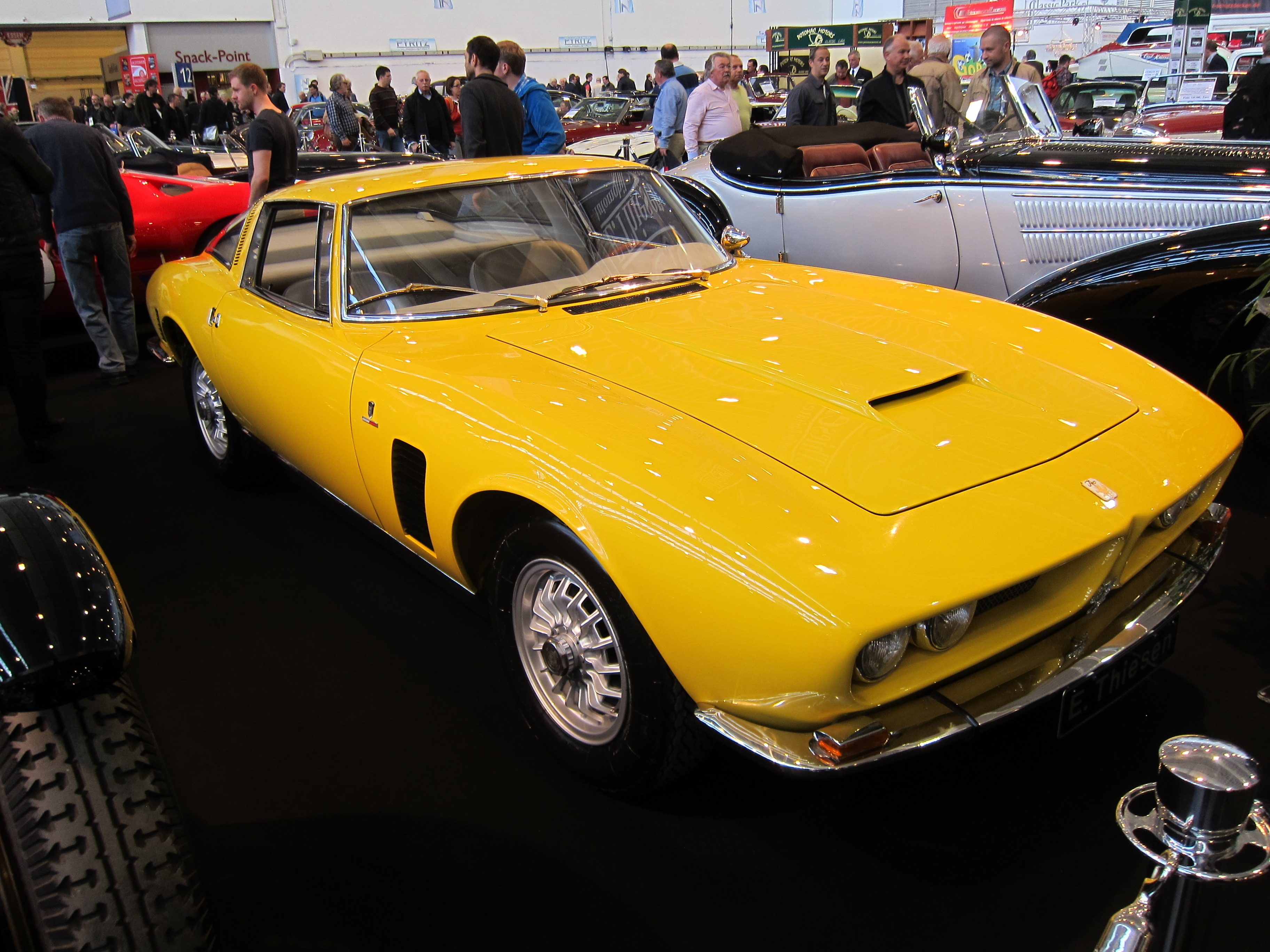 Techno Classica 2014